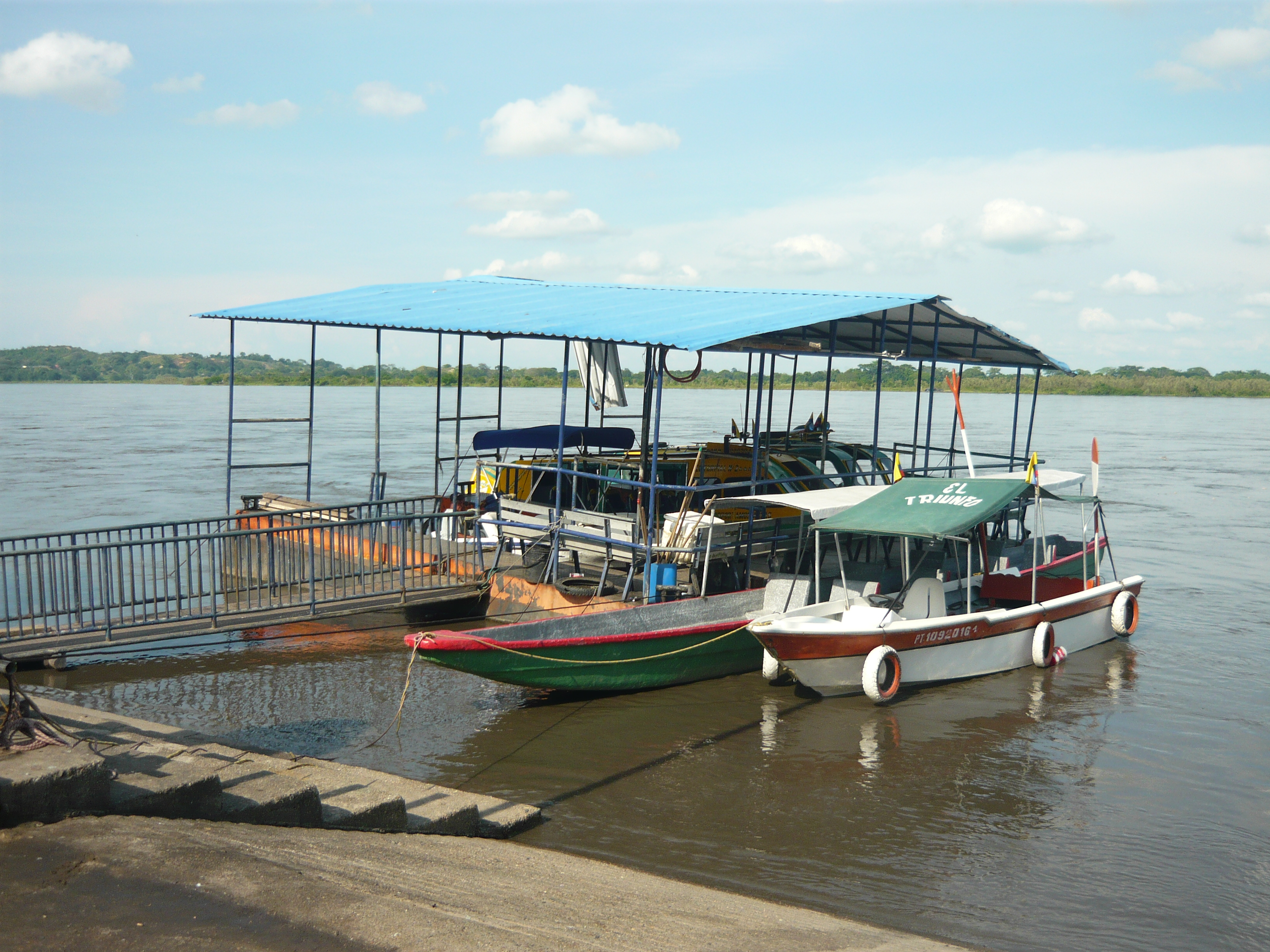 Muelle flotante sobre el Rio Magdalena ubicado en Puerto Berrio - Antioquia.